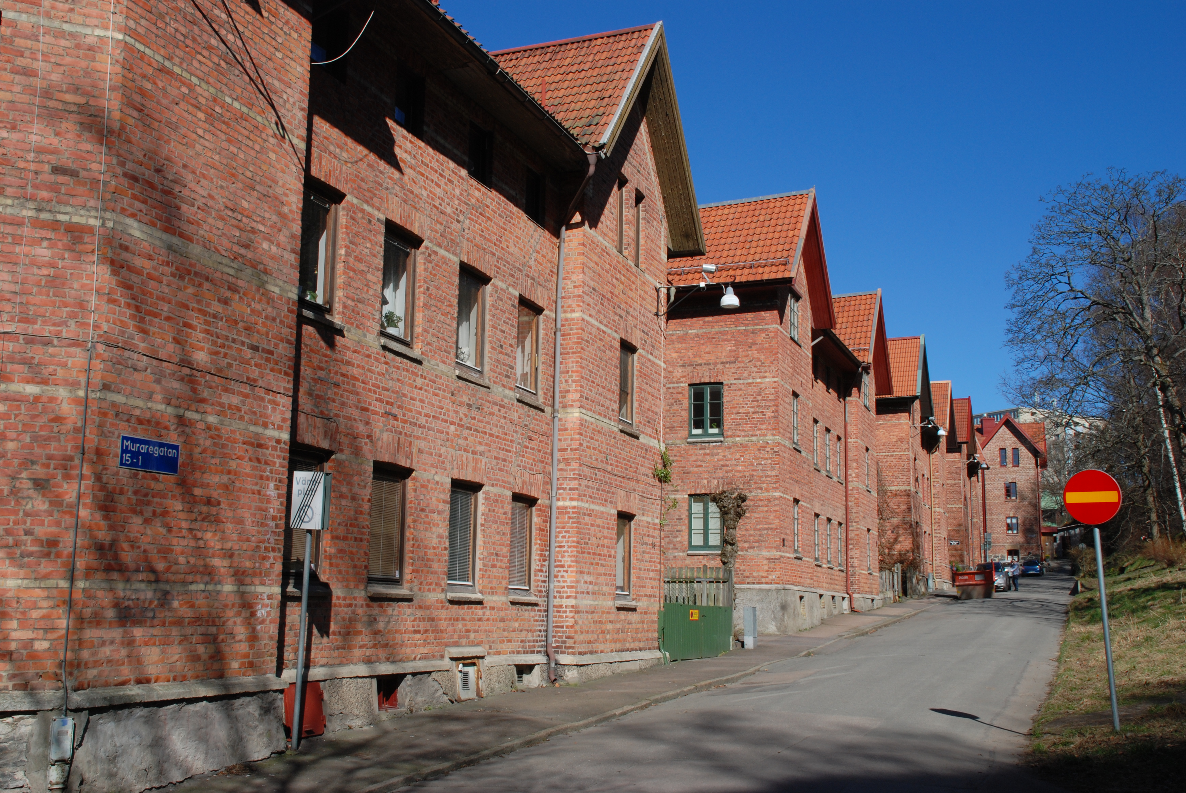 Muraregatan i stadsdelen Annedal i Göteborg i riktning norrut från Brunnsgatan mot Spekebergsgatan.